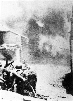 “我军攻人枣阳城北门”